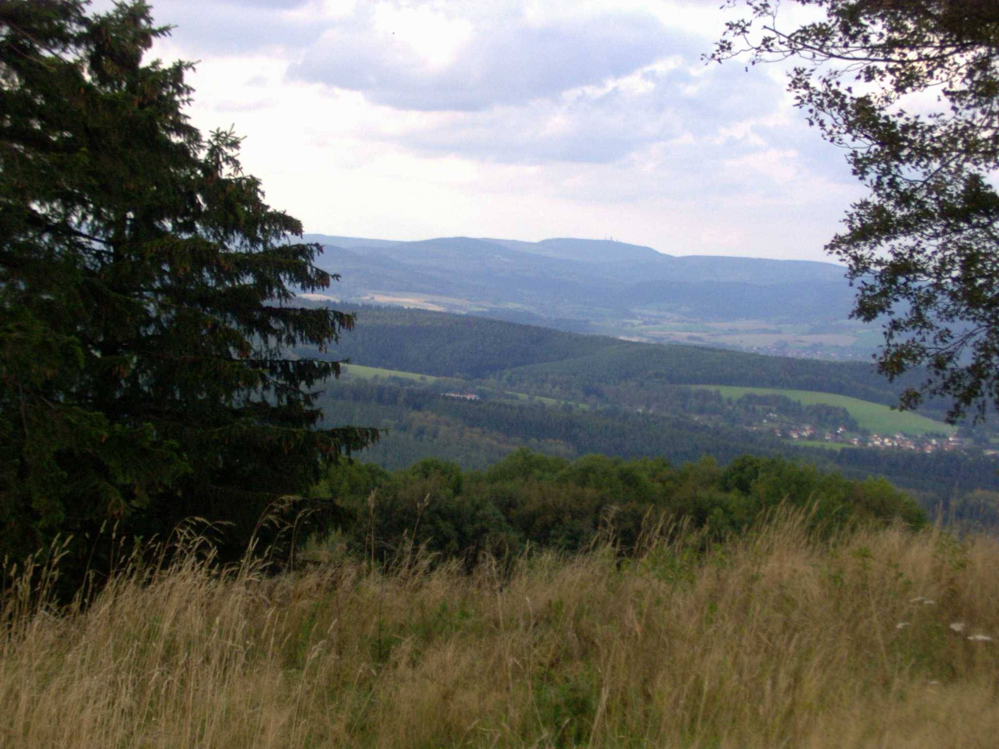 Der Große Inselsberg (916 m) vom Dolmar (739 m) aus gesehen.